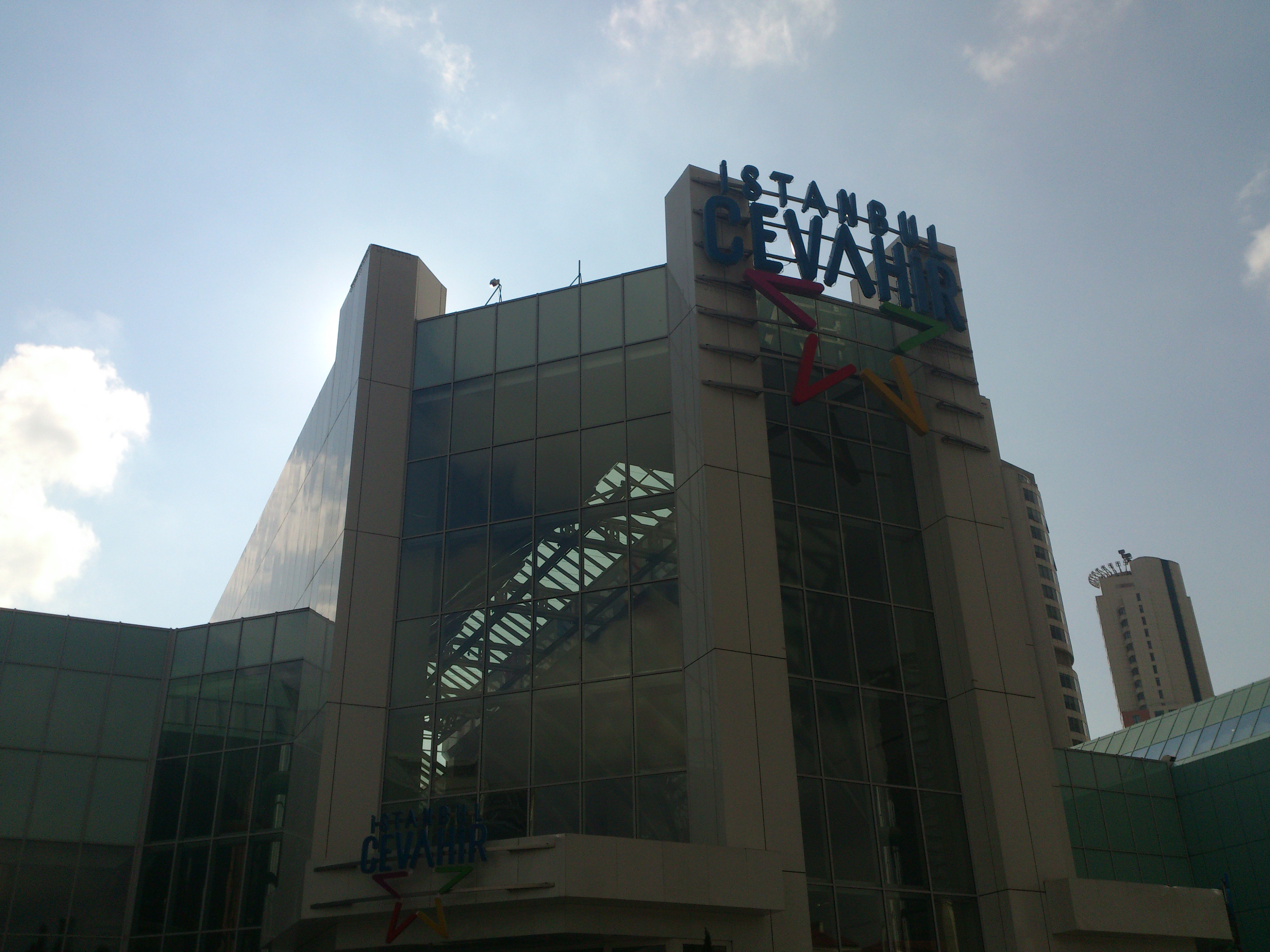 Türkmençe: Jewahir Söwda Merkezi